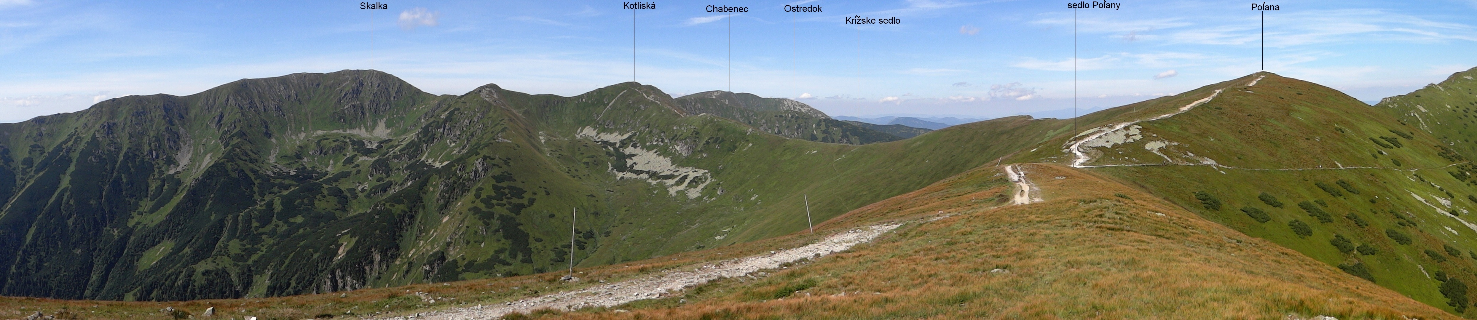 Skalka